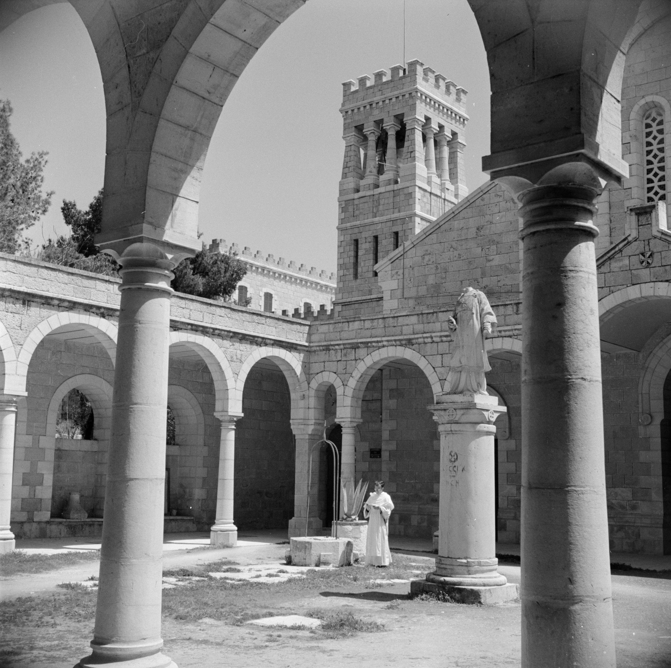 Collectie / Archief : Fotocollectie Van de Poll Reportage / Serie : Midden-Oosten 1950-1955: Jeruzalem Beschrijving : Monnik in kruisgang van de Ã‰cole biblique et archÃ©ologique franÃ§aise de JÃ©rusalem (EBAF) Annotatie : Ten tijde van de opname lag Jeruzalem in JordaniÃ« Datum : 1950 Locatie : IsraÃ«l, Jeruzalem, JordaniÃ« Trefwoorden : gebouwen, monniken, scholen Fotograaf : Poll, Willem van de Auteursrechthebbende : Nationaal Archief Materiaalsoort : Negatief (zwart/wit) Nummer archiefinventaris : bekijk toegang 2.24.14.02 Bestanddeelnummer : 255-5370